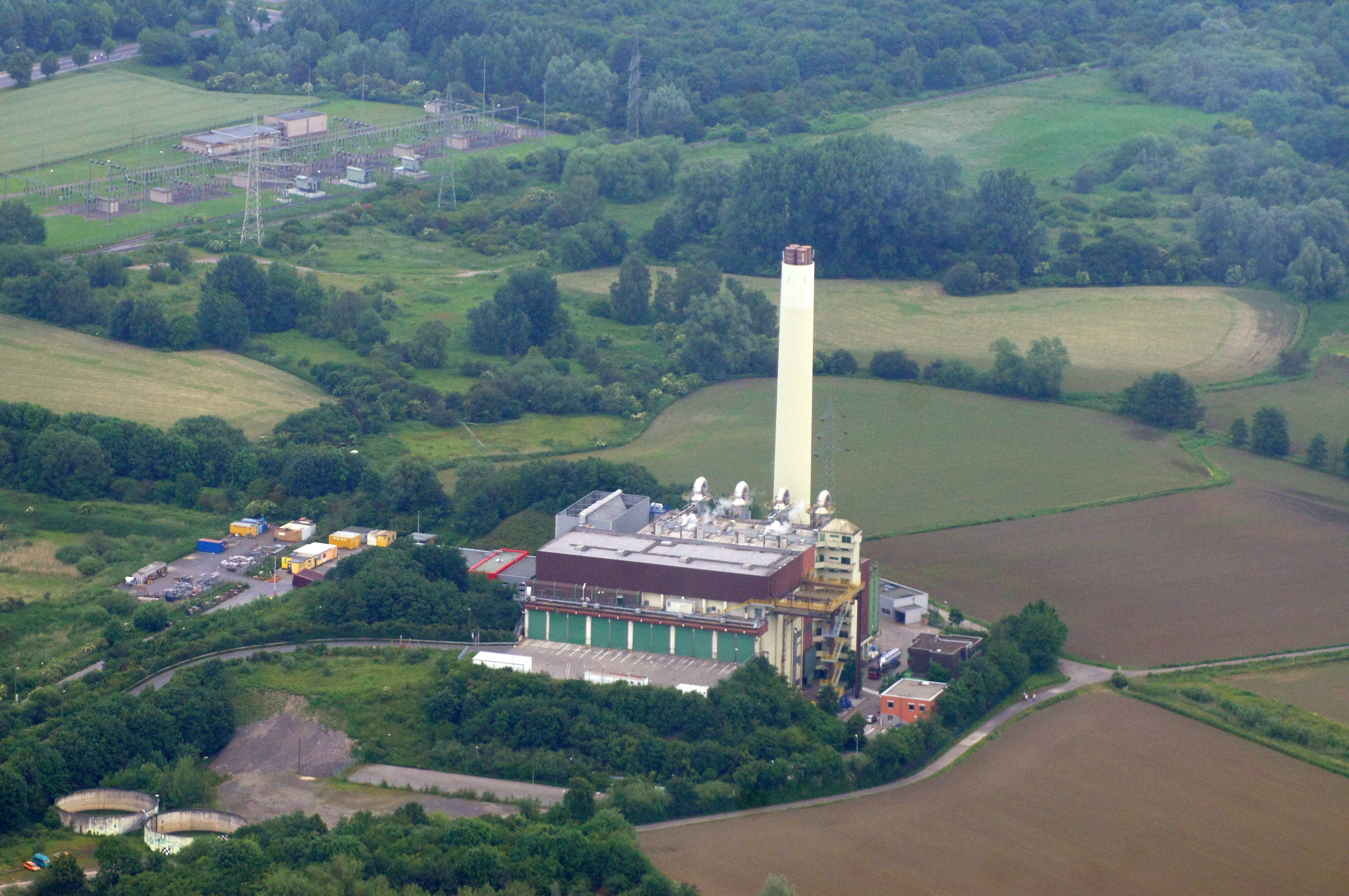 Müllverbrennungsanlage, Stadt Hamm, Nordrhein-Westfalen, Deutschland. Das Bild entstand während des Münsterland-Fotoflugs am 1. Juni 2014. Hinweis: Die Aufnahme wurde aus dem Flugzeug durch eine Glasscheibe hindurch fotografiert.